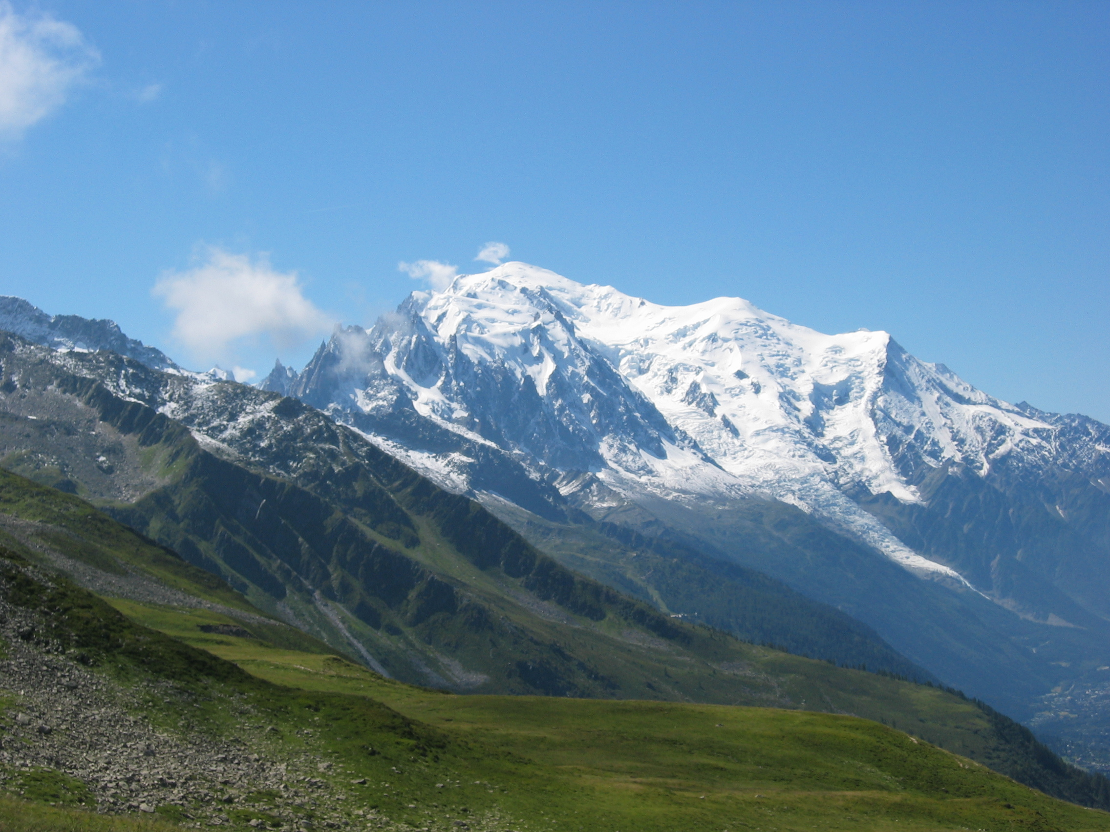 le Mont Blanc vu depuis le chemin du col de Balme au refuge Alber Ier.